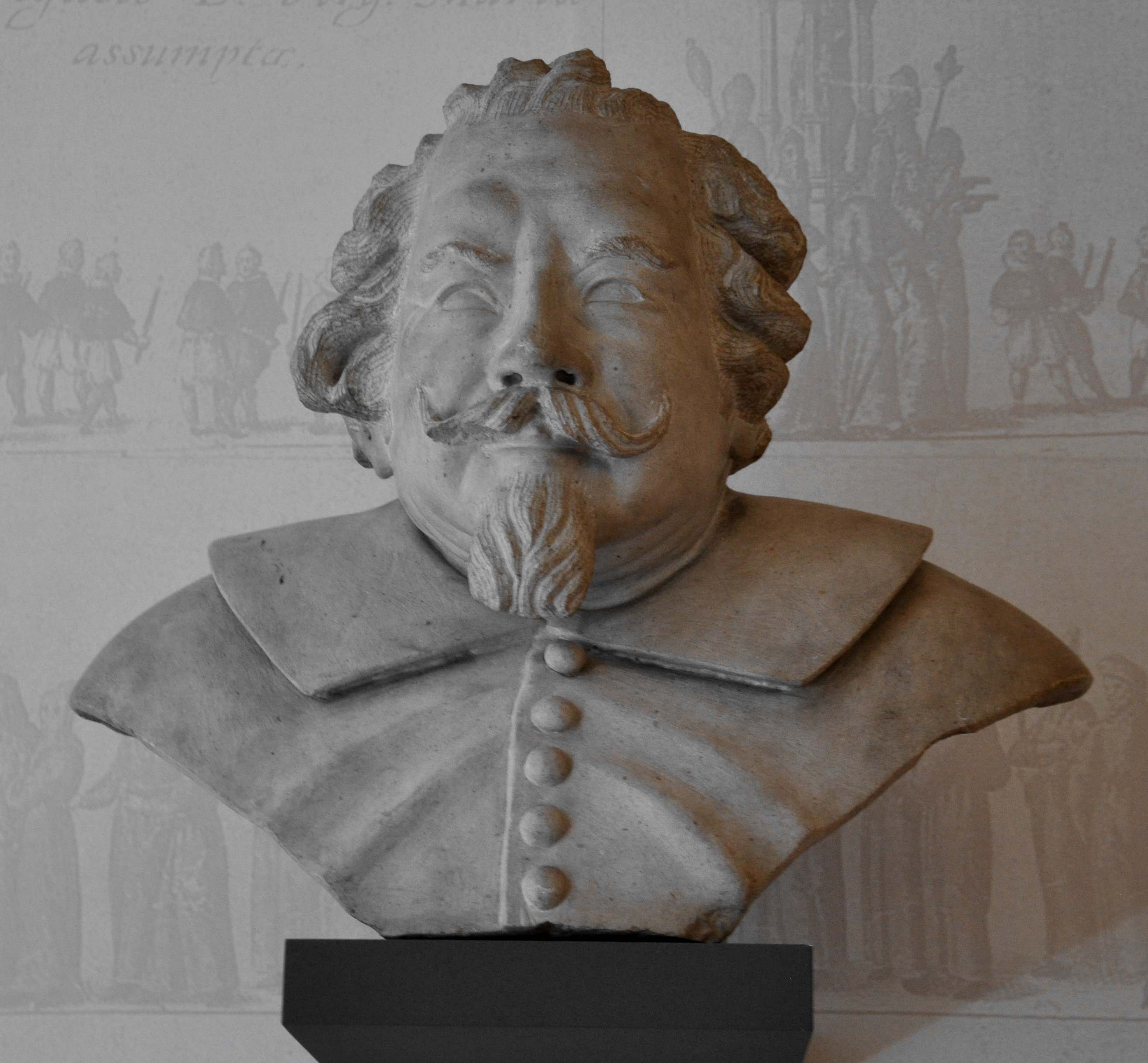 Büste des Dombaumeisters Santino Solari, anonym, Salzburg um 1635, Untersberger Marmor; Salzburg Museum, Inv. Nr. 6043/49, Schenkung Landrat Wänzler 1948